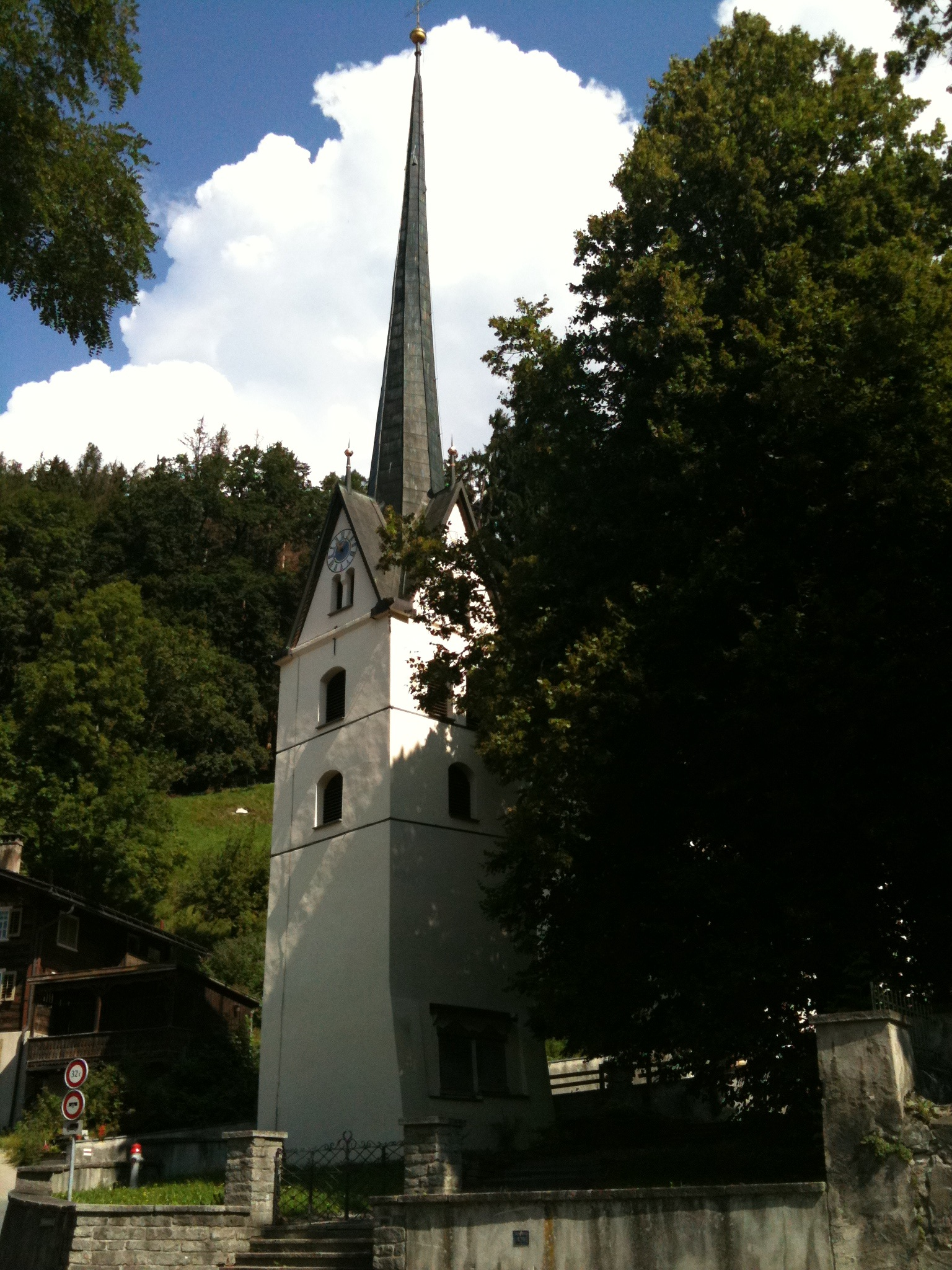 Turm der reformierten Kirche Grüsch (Kanton Graubünden)